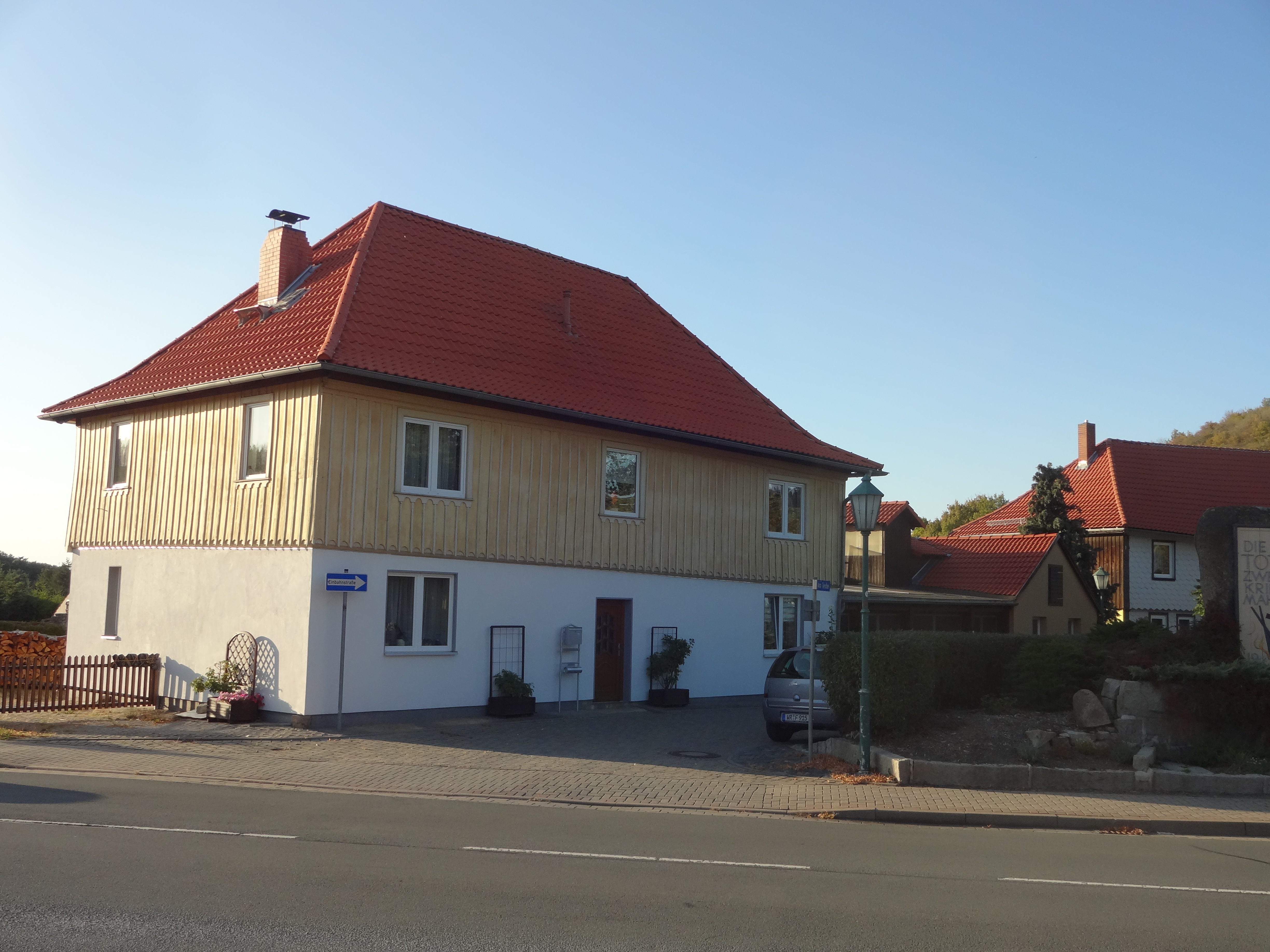 denkmalgeschütztes Wohnhaus in der Teichstraße 1 in Heimburg